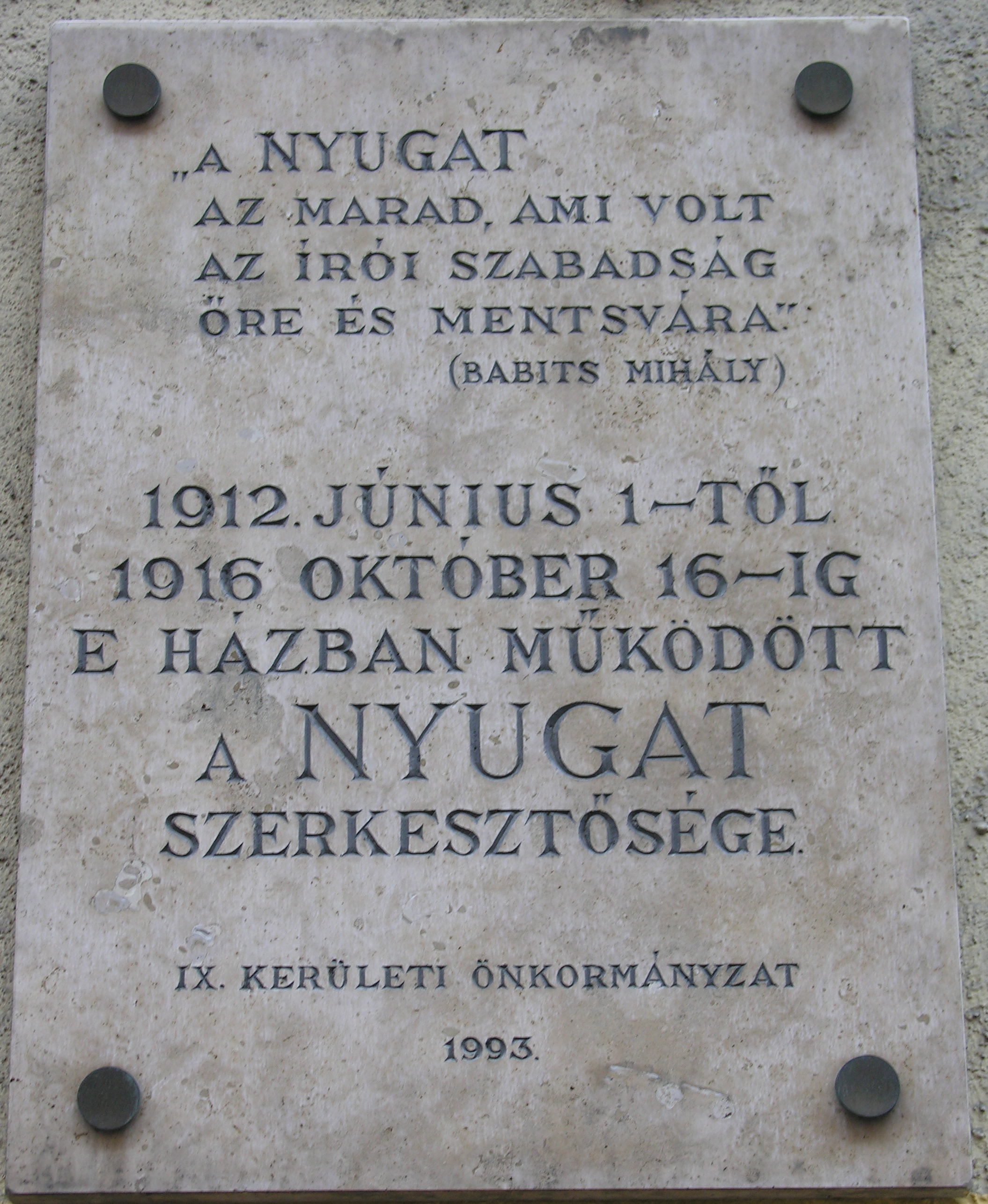 A Nyugat folyóirat emléktáblája, Budapest, IX. Lónyay utca 18/b